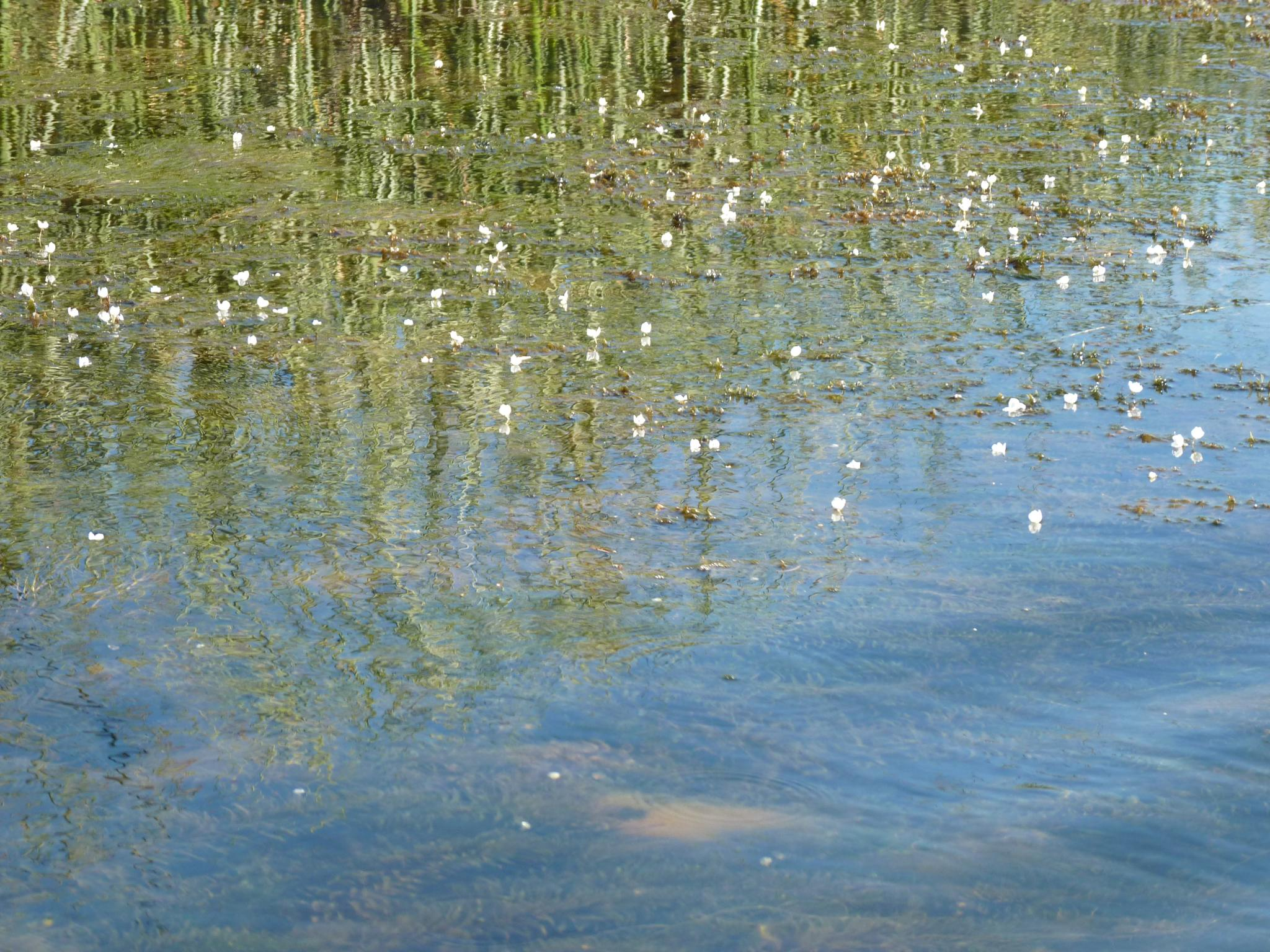 Humedal Las Mulatas, Valdivia